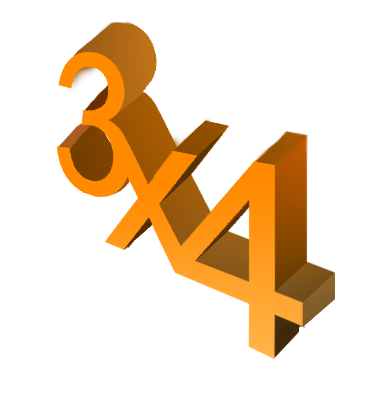 Recreación del primer logo del programa 3x4 en su primera temporada, hecho a mano